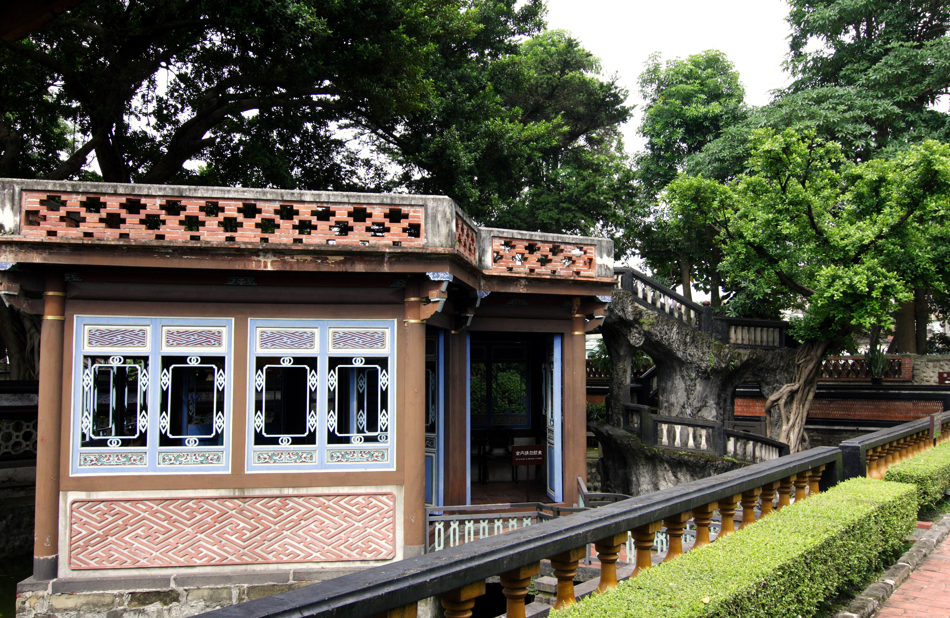 臺灣臺北縣板橋市的林本源園邸中的庭園建築月波水榭